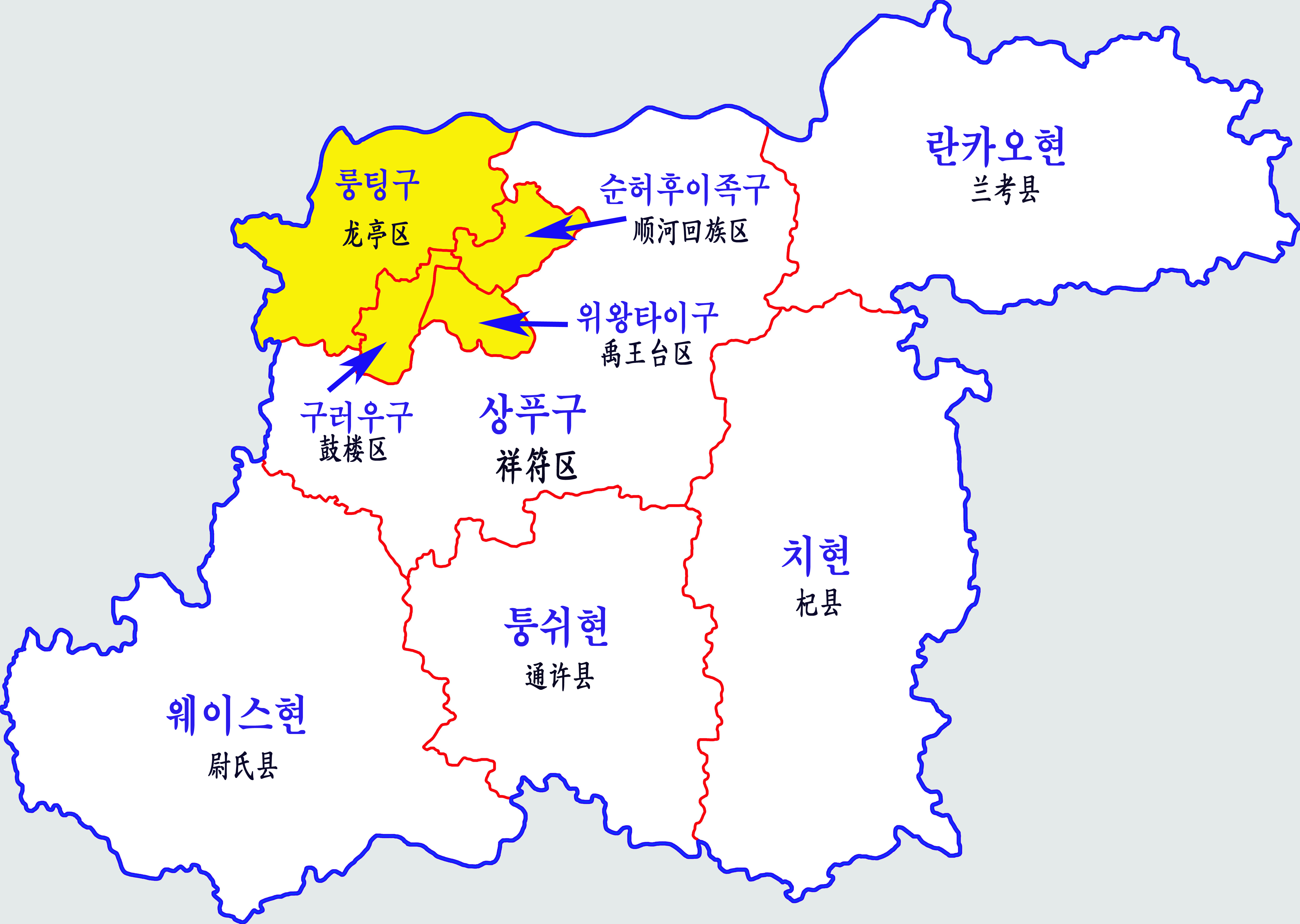 카이펑시 행정구역